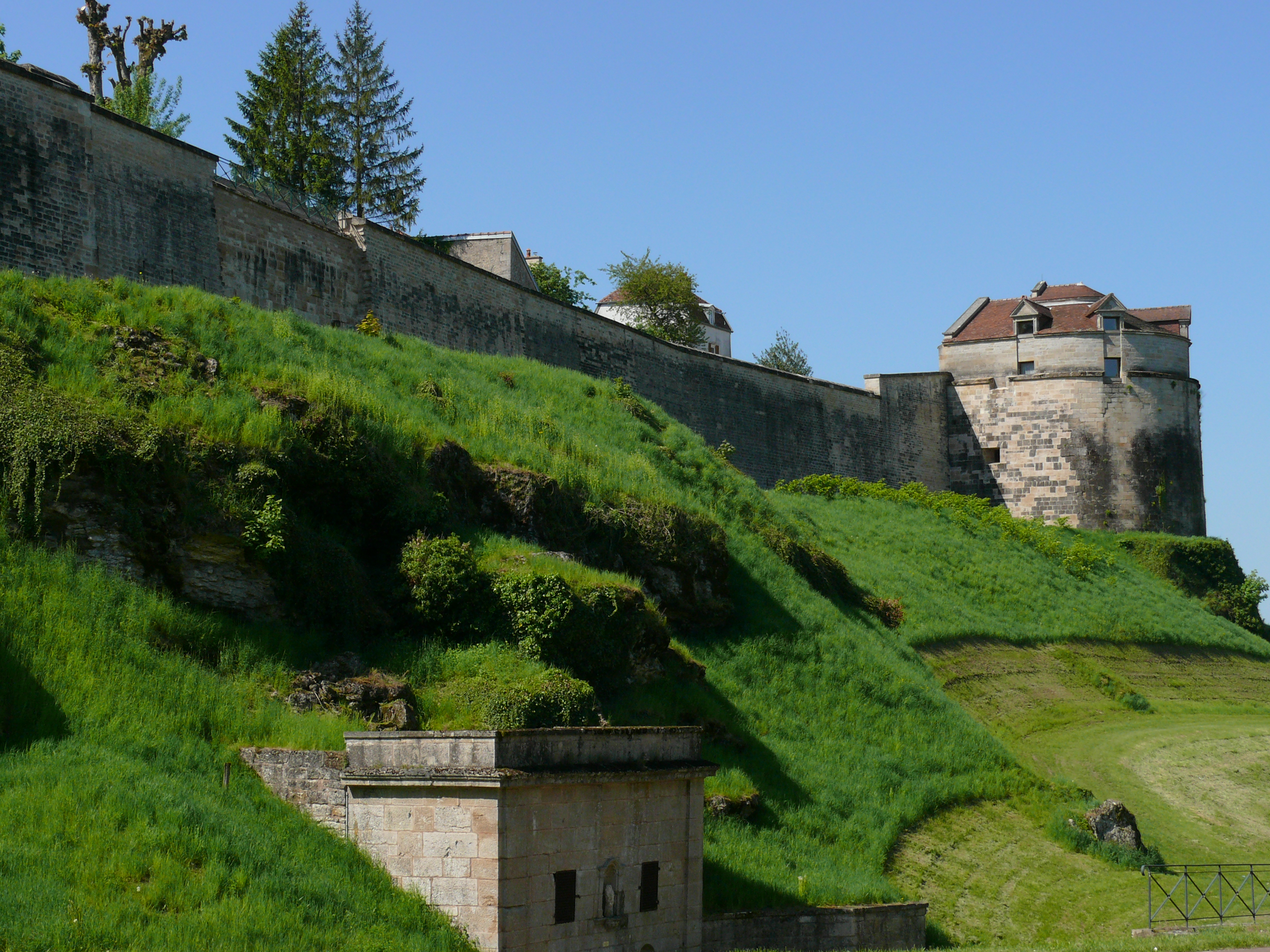 Remparts de Langres - Front nord